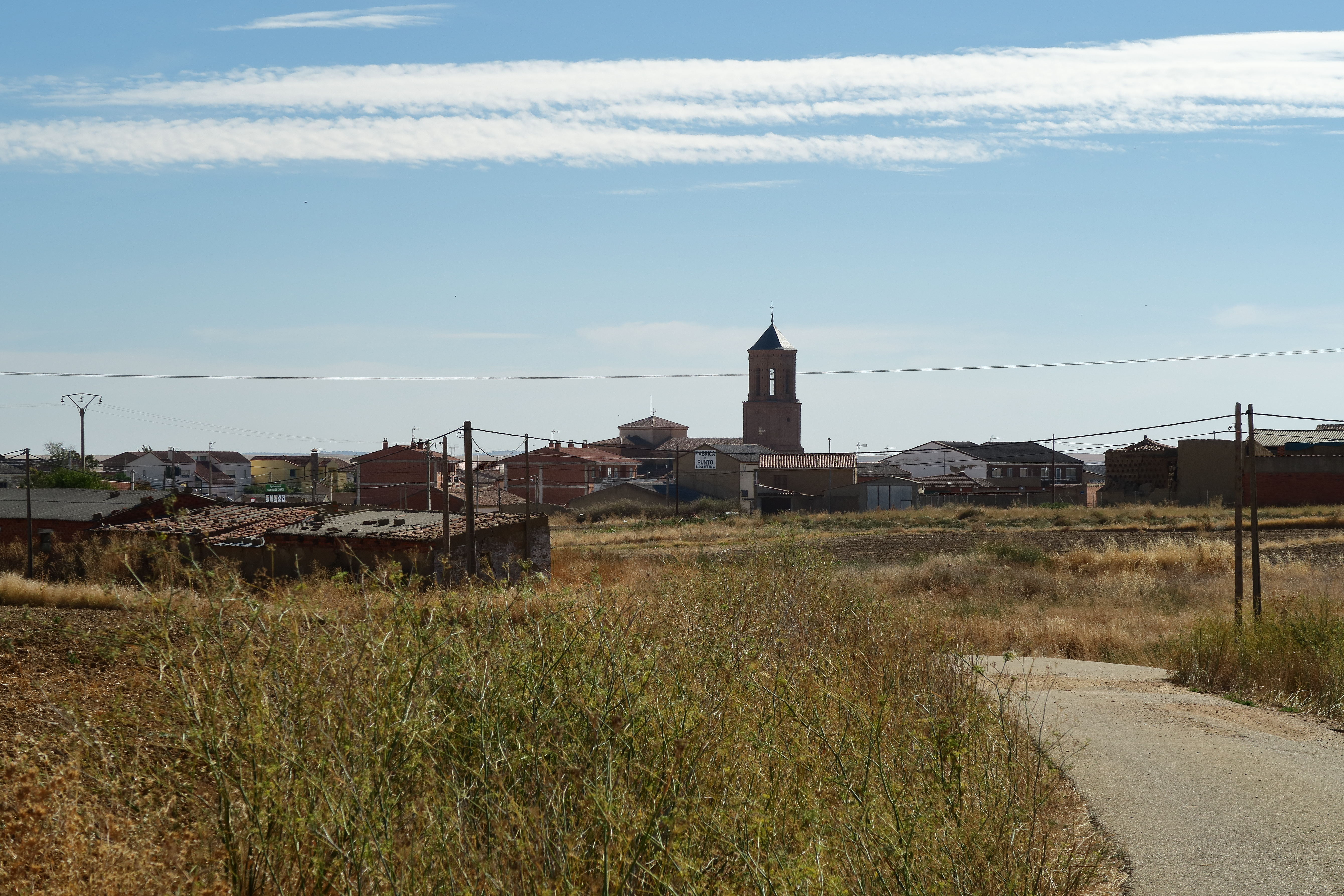 Villarrín de Campos, vista población